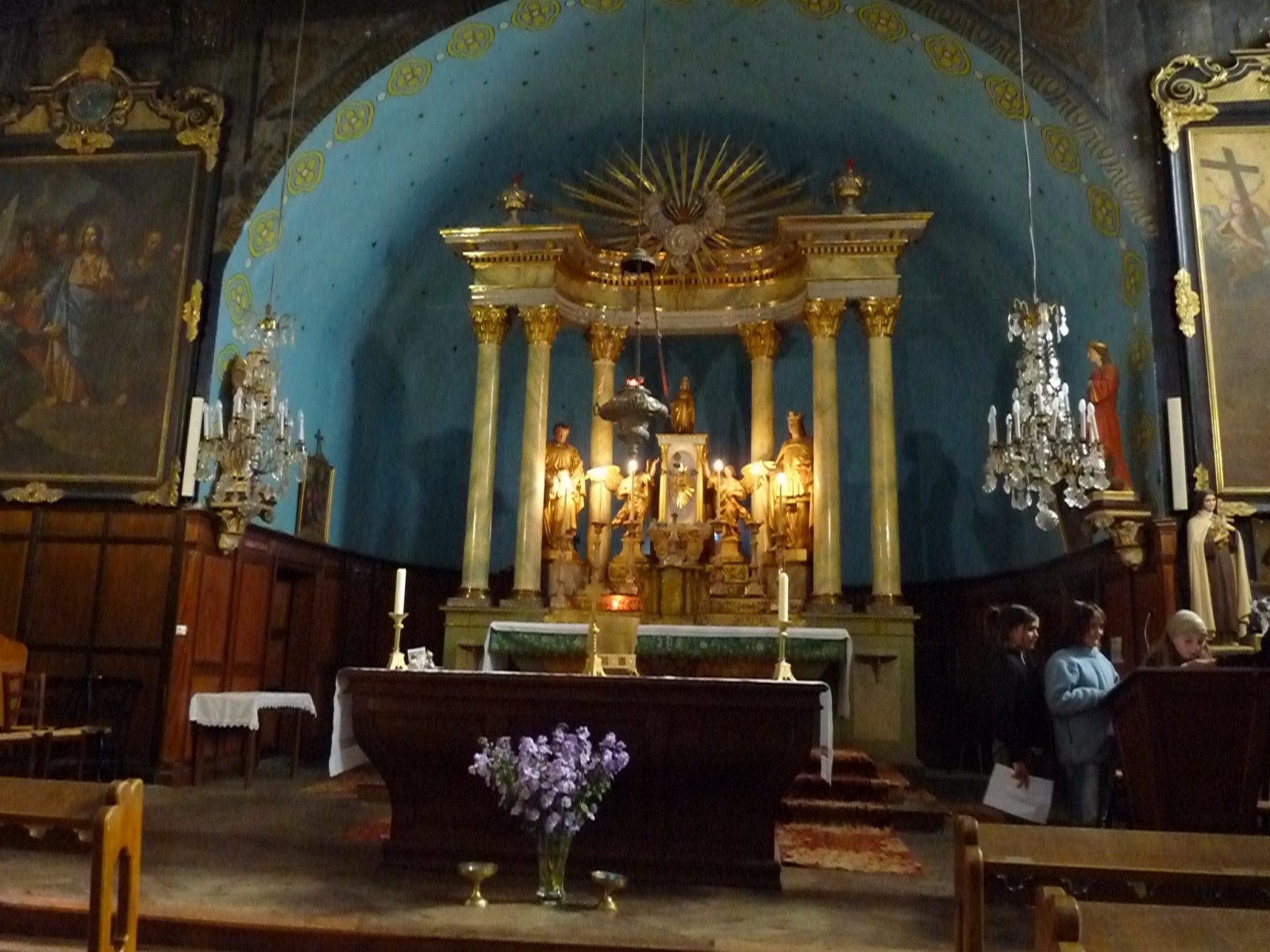 Eglise de Mont-Louis, Pyrénées-Orientales, France